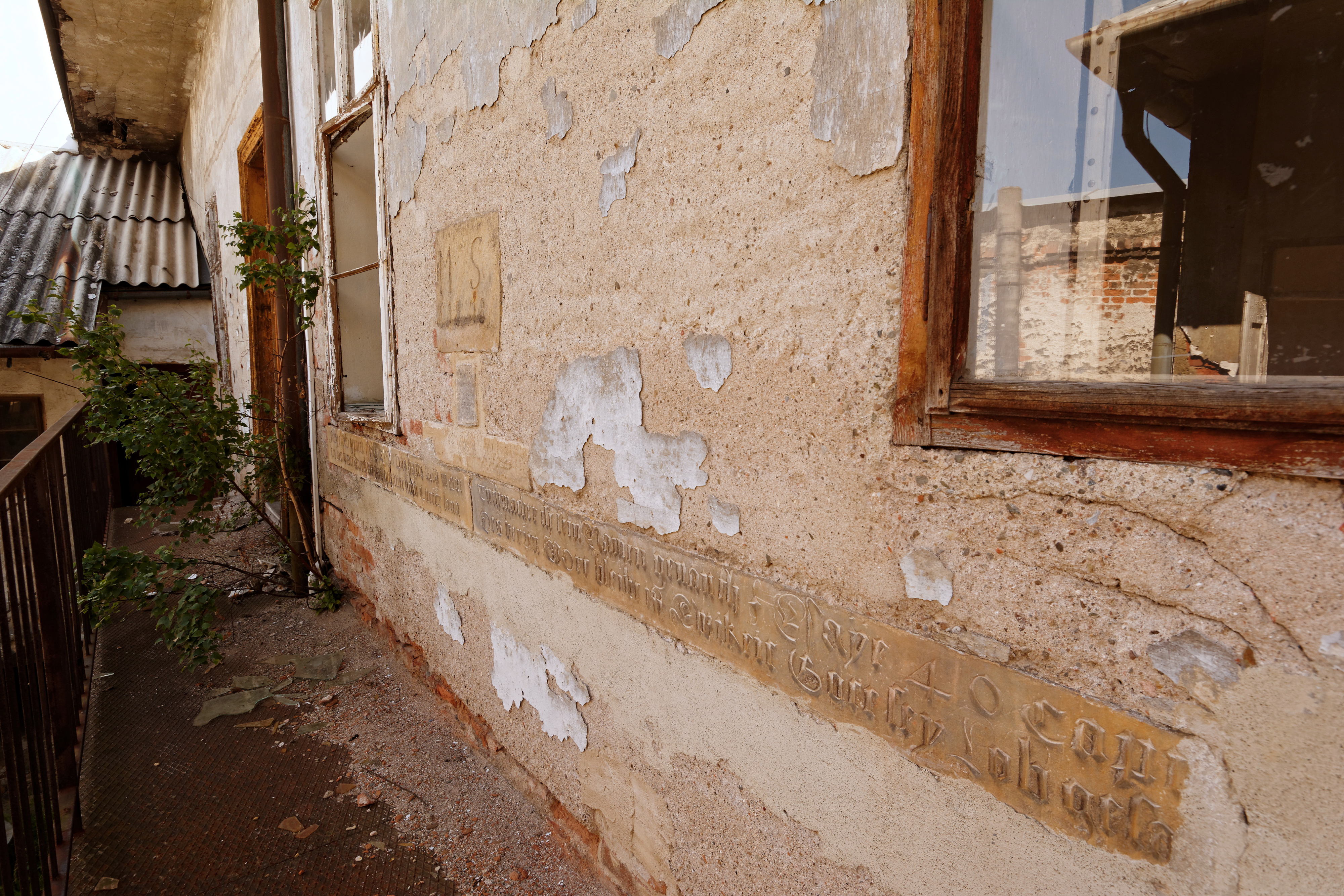 Langův dům - interiér, Litovel, Masarykova č.p. 769/2.